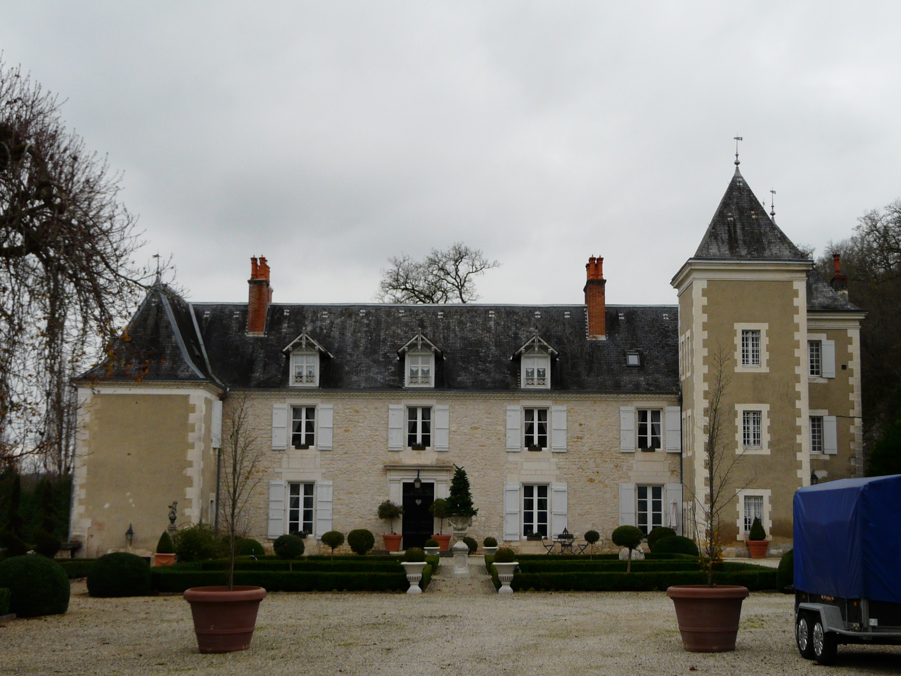 Le castel de Puy ol Faure, Cubjac, Dordogne, France.